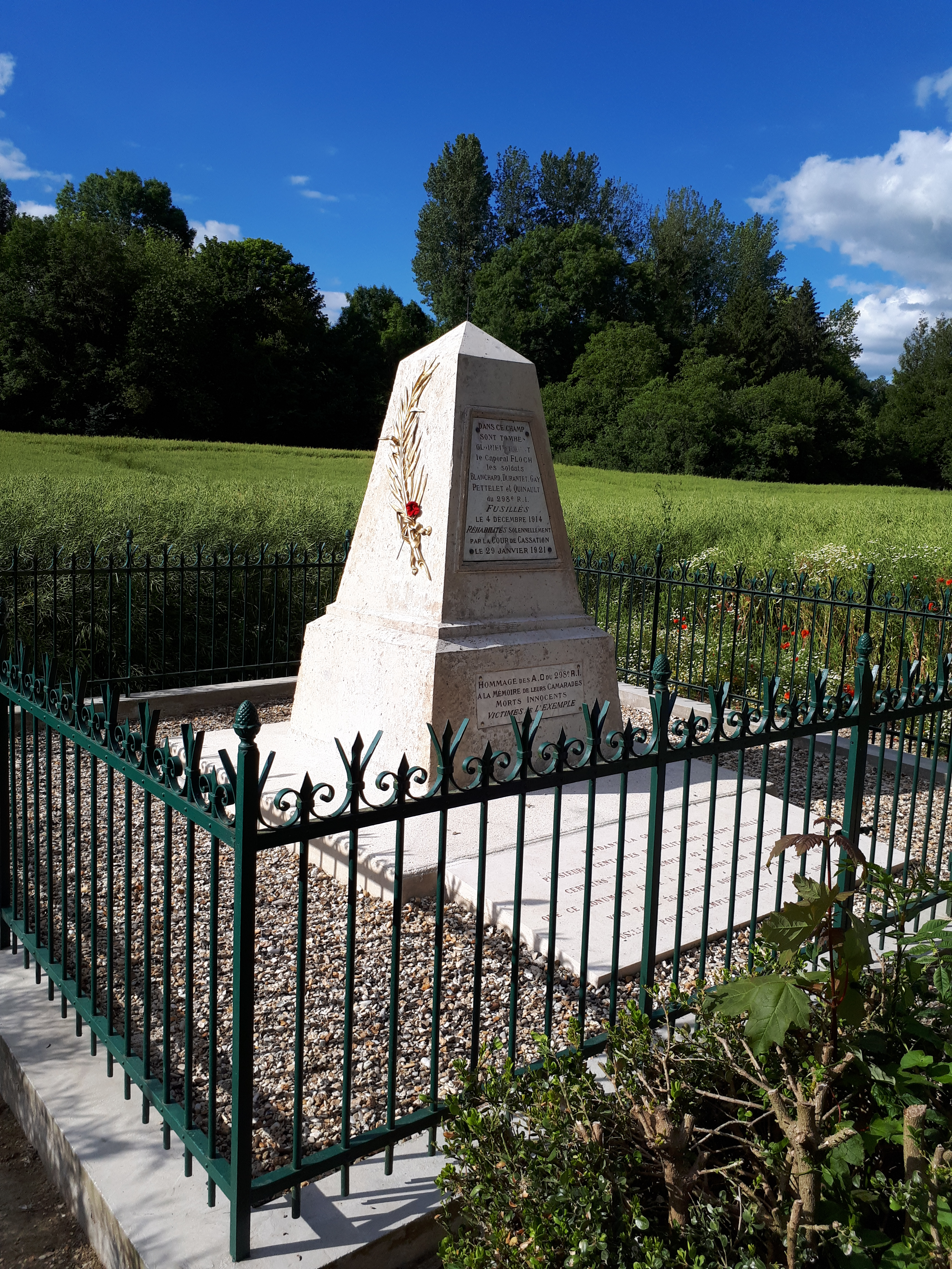 Monument des Fusillés à Nouvron-Vingré (Aisne) 3